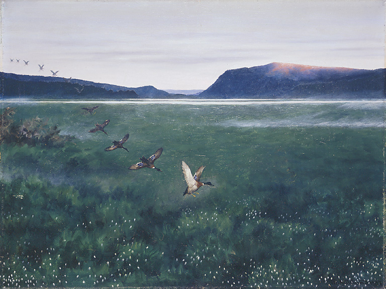 painting to a fairytale by Asbjørnsen og Moe